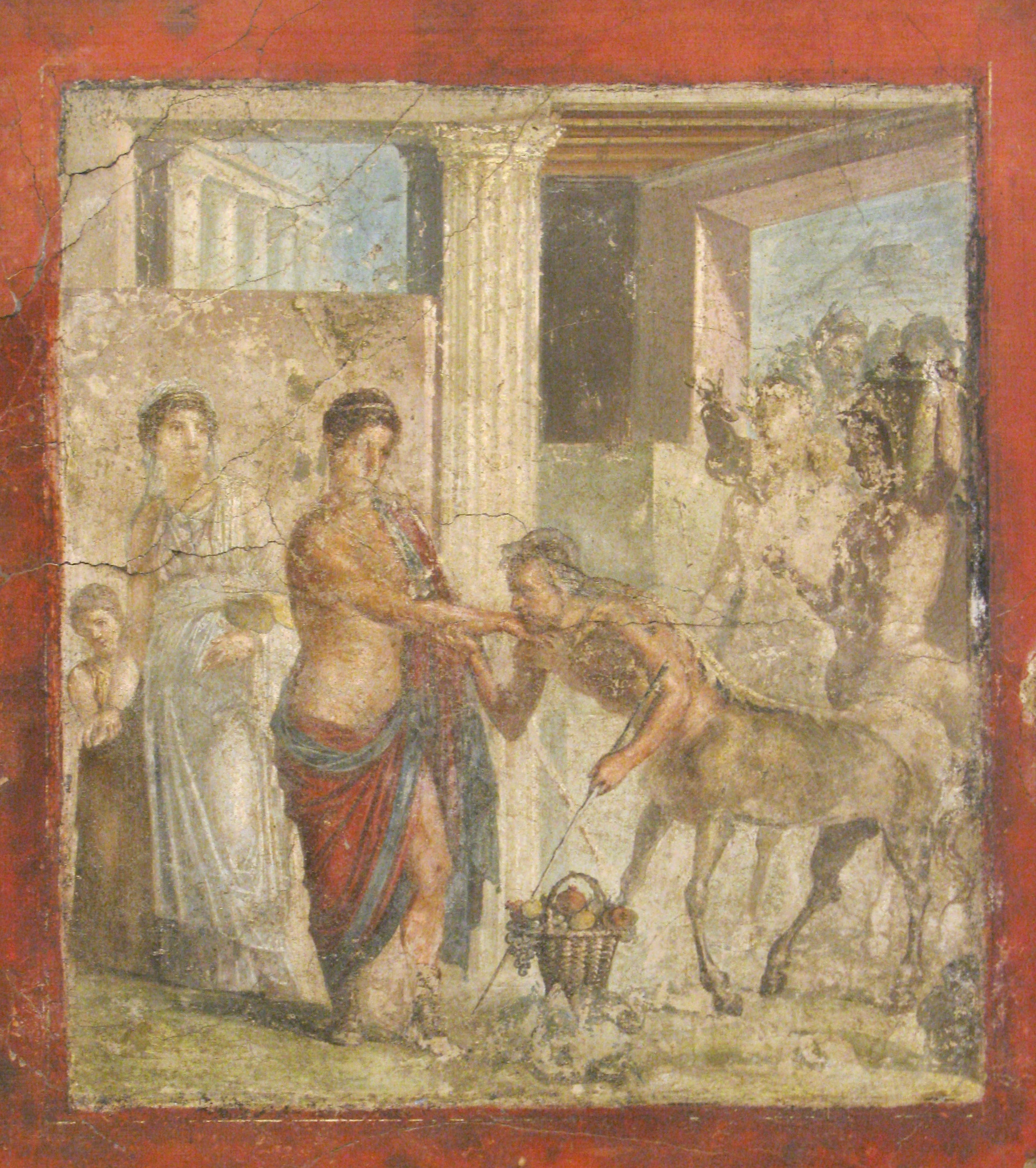 Piritoo, Museo archeologico nazionale di Napoli, (inv. nr. 9044). Da Pompei, Casa di Gavius Rufus. La scena mostra le nozze di Piritoo ed Ippodamia, alle quali parteciparono anche i Centauri, i quali stanno per entrare nel palazzo, portando doni fra i quali vi è un bellissimo cestino pieno di frutta, deposto a terra.